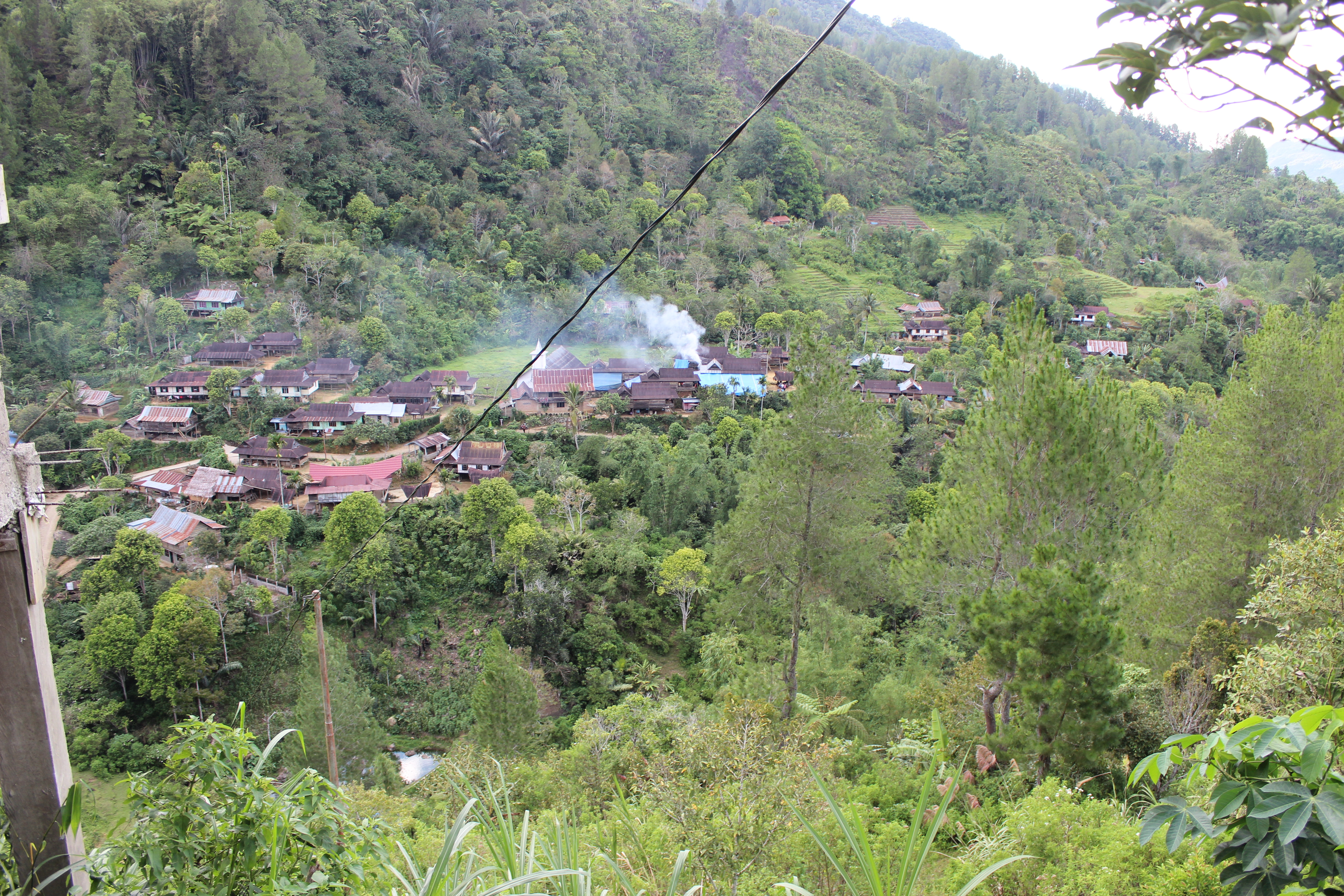 Mamasa, Mamasa Sub-District, Mamasa Regency, West Sulawesi, Indonesia